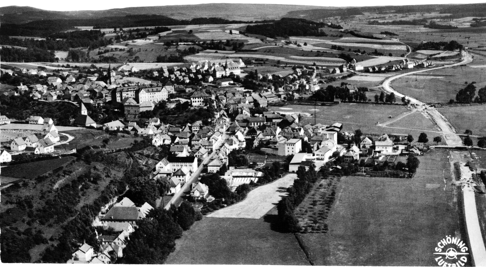 Luftbild der sich im Bau befindenden Umgehungsstraße. Die "Drohtsbrücke" befindet sich in der rechten Bildmitte, sie diente dazu eine häufig überschwemmte Wiesenmulde zu überbrücken. An ihrer Stelle befindet sich heute die Kreuzung der B 289 mit der Bahnhofsstraße.